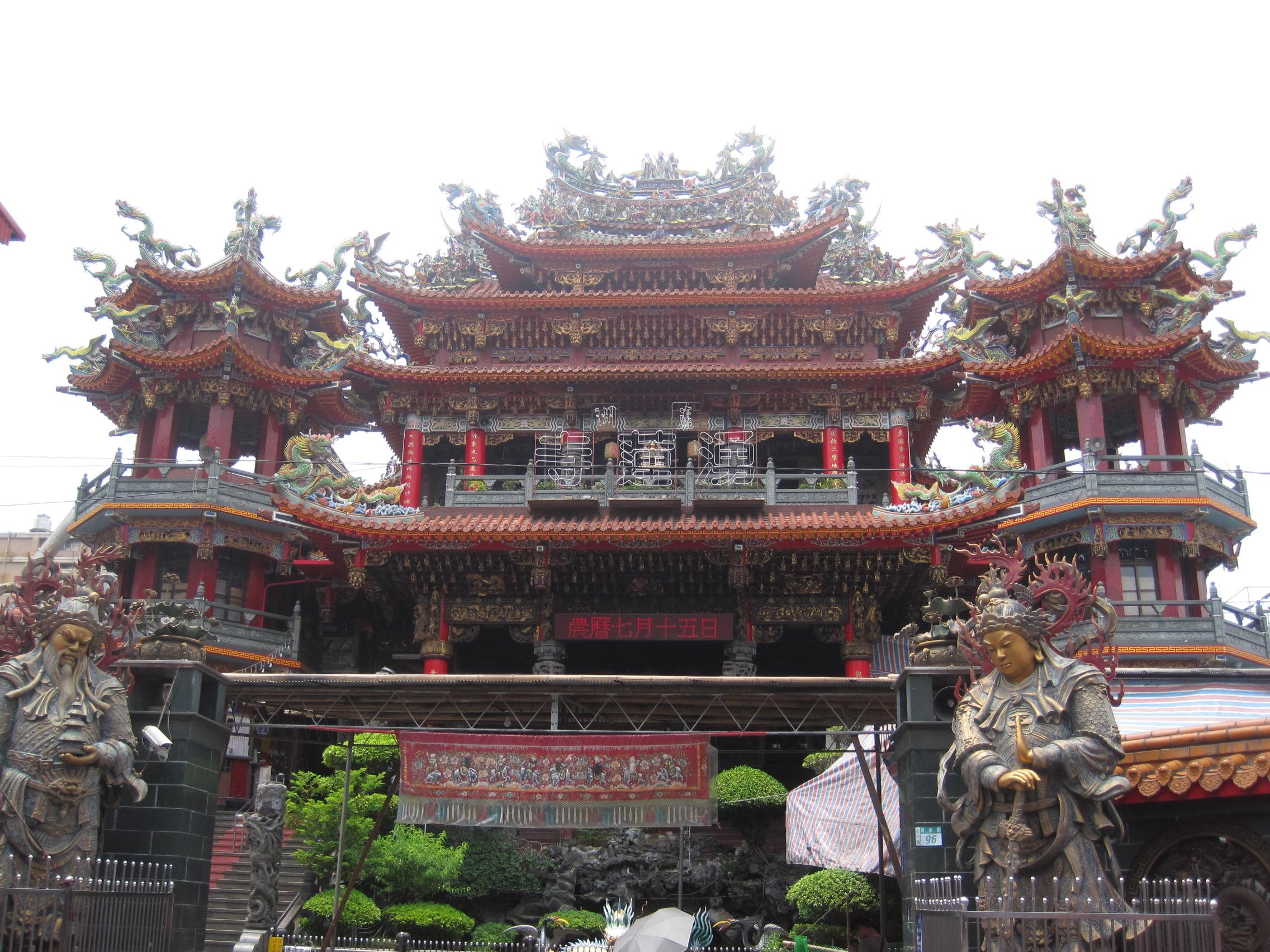 蘆洲湧蓮寺